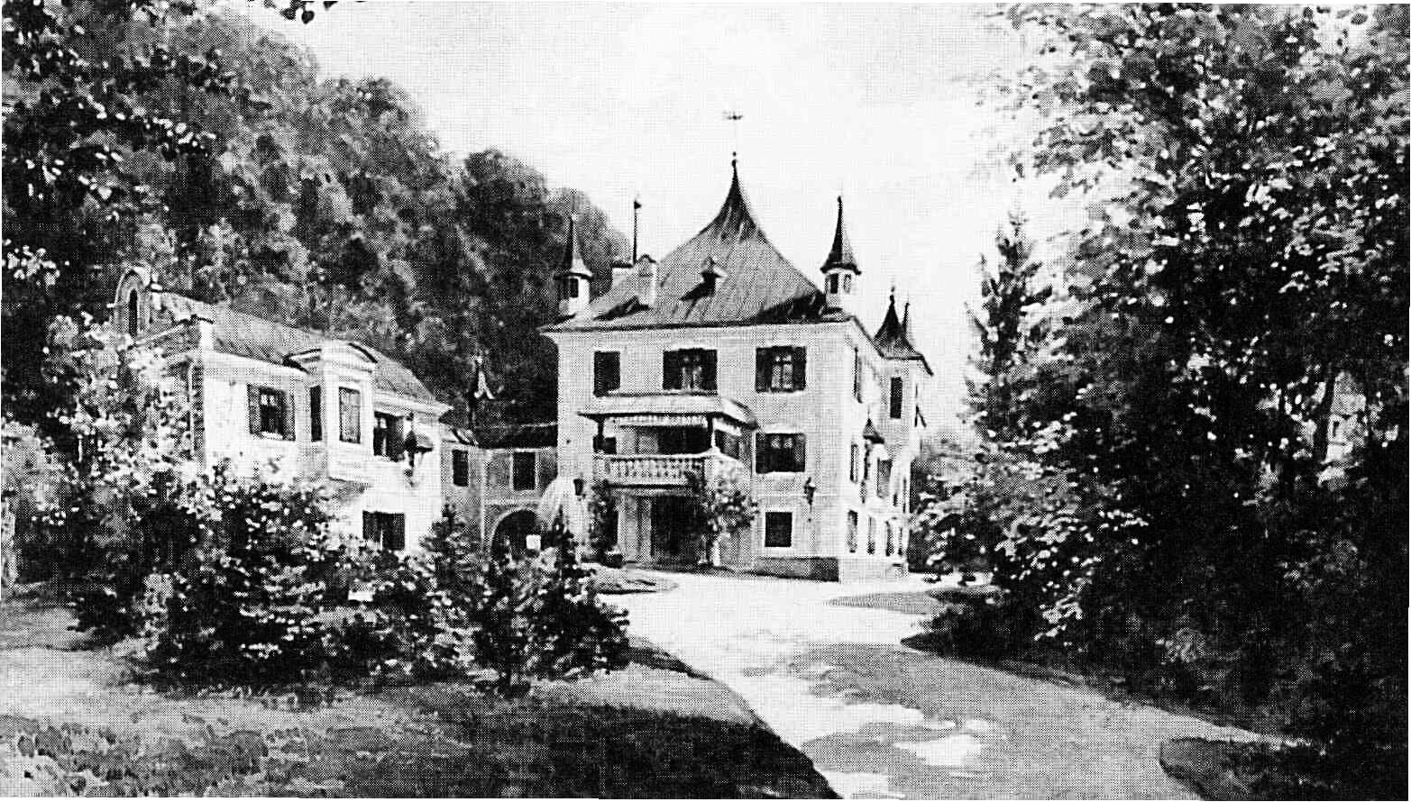 Schloss Fürberg, Aquarell von Franz Kuhlstrunk